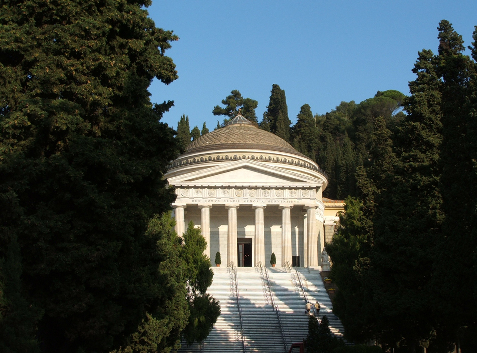 Il cosiddetto "Pantheon" del Cimitero monumentale di Staglieno a Genova.